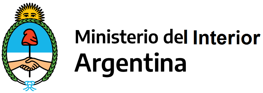 Ministerio del Interior